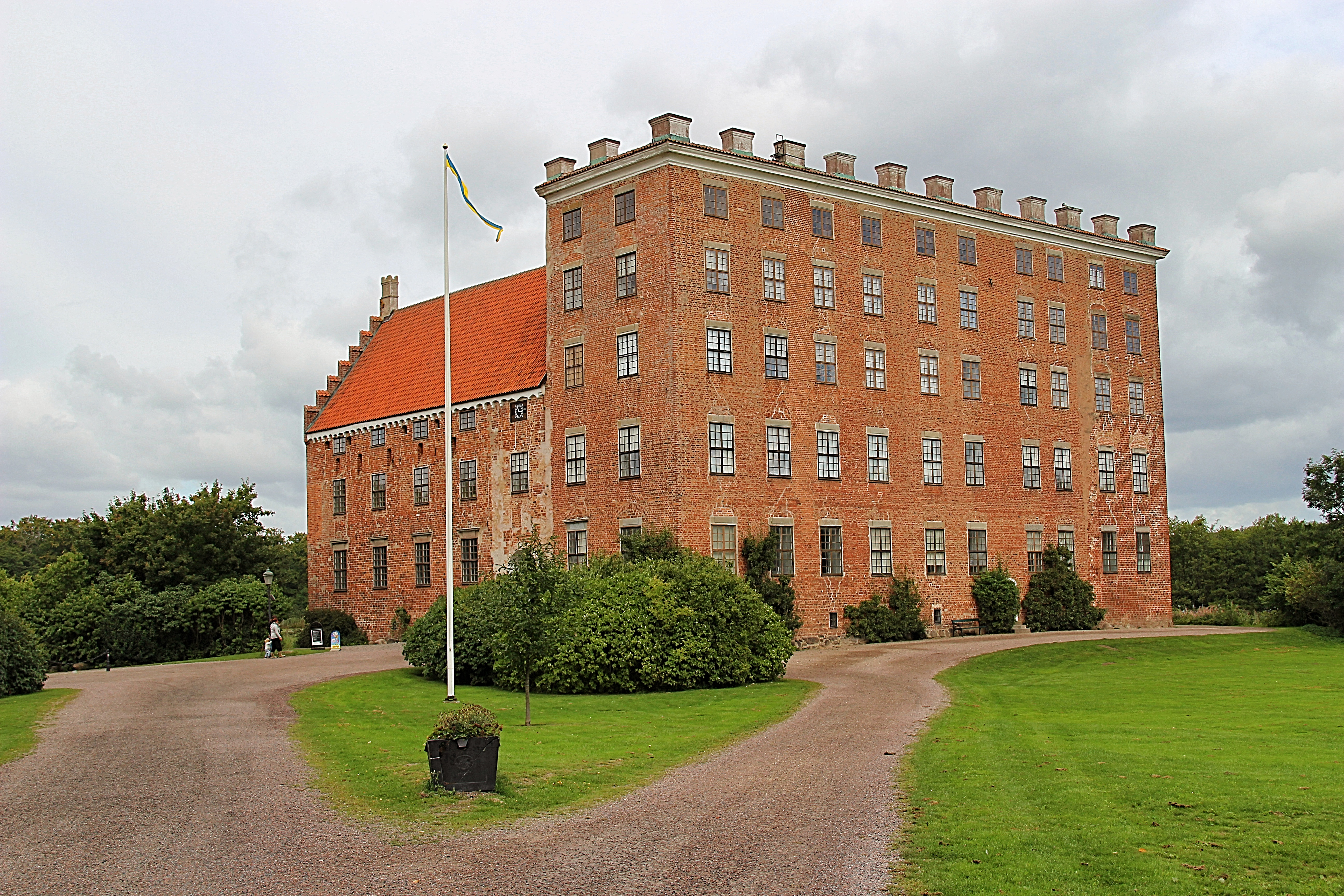 Svaneholms slott (Svaneholm 2:1)